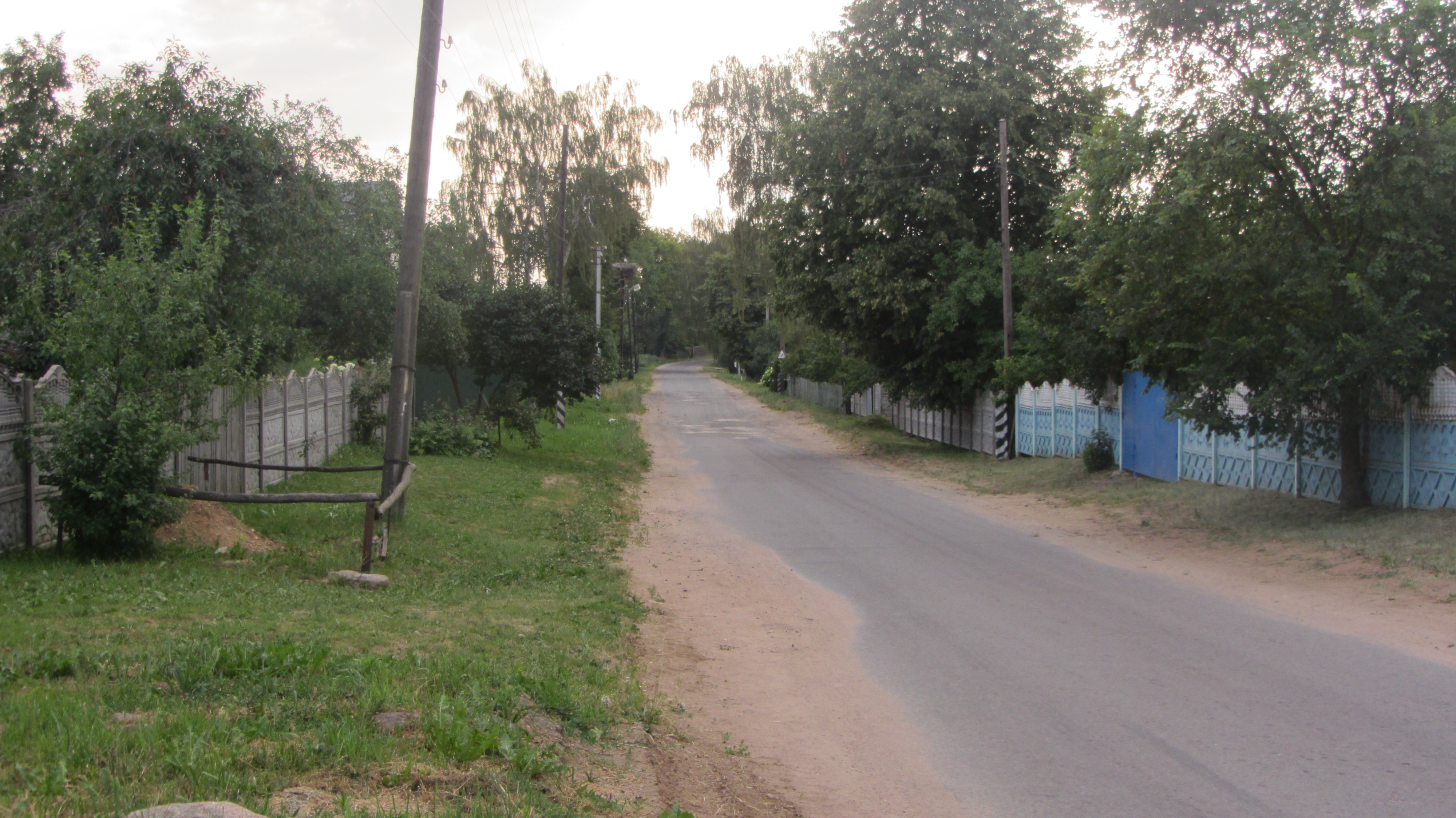 Вёска Ленінскі, Пухавіцкі раён. Цэнтральная вуліца.